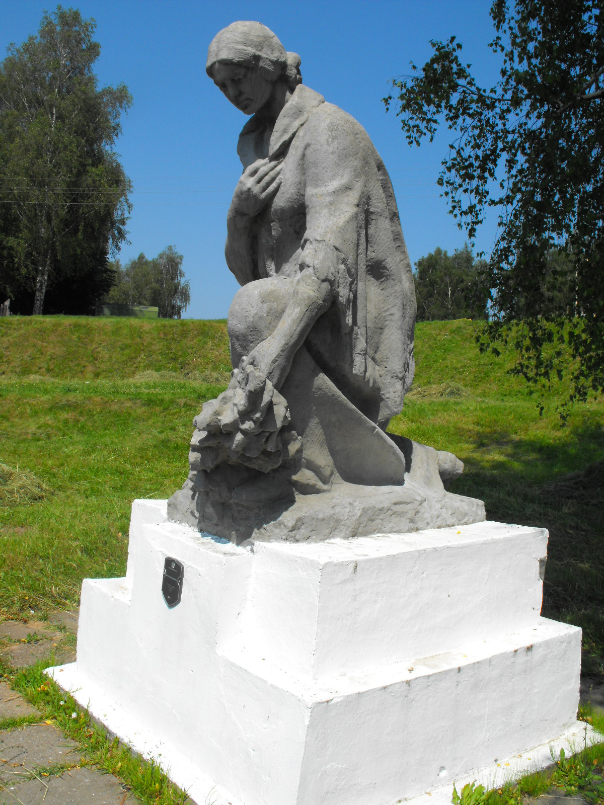 Памятник "Скорбящая мать" на месте массового убийства в октябре-ноябре 1942 года евреев - узников Воложинского гетто. Находится на территории городского стадиона, расположенного между улицами Белорусской, Набережной и Комарова.